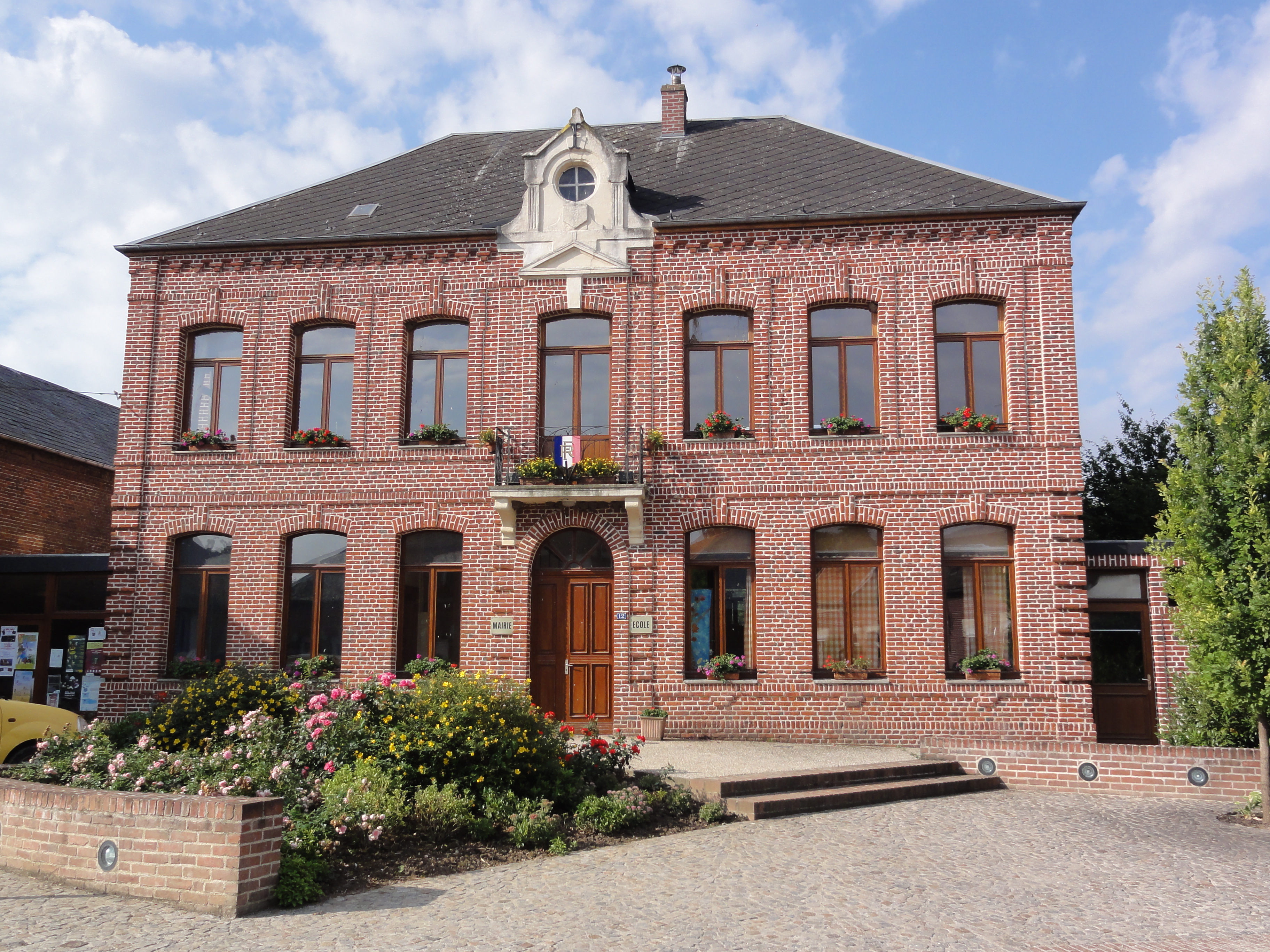 Ghissignies (Nord, Fr) mairie-école.